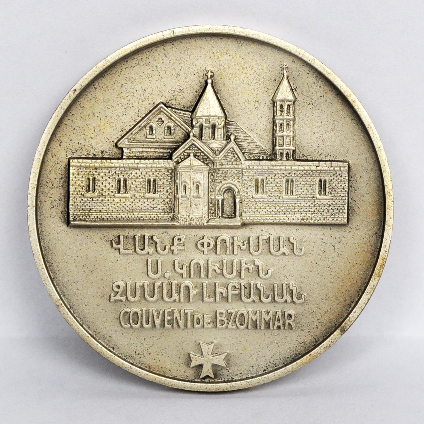 Զմմառի Սուրբ Տիրամոր վանք